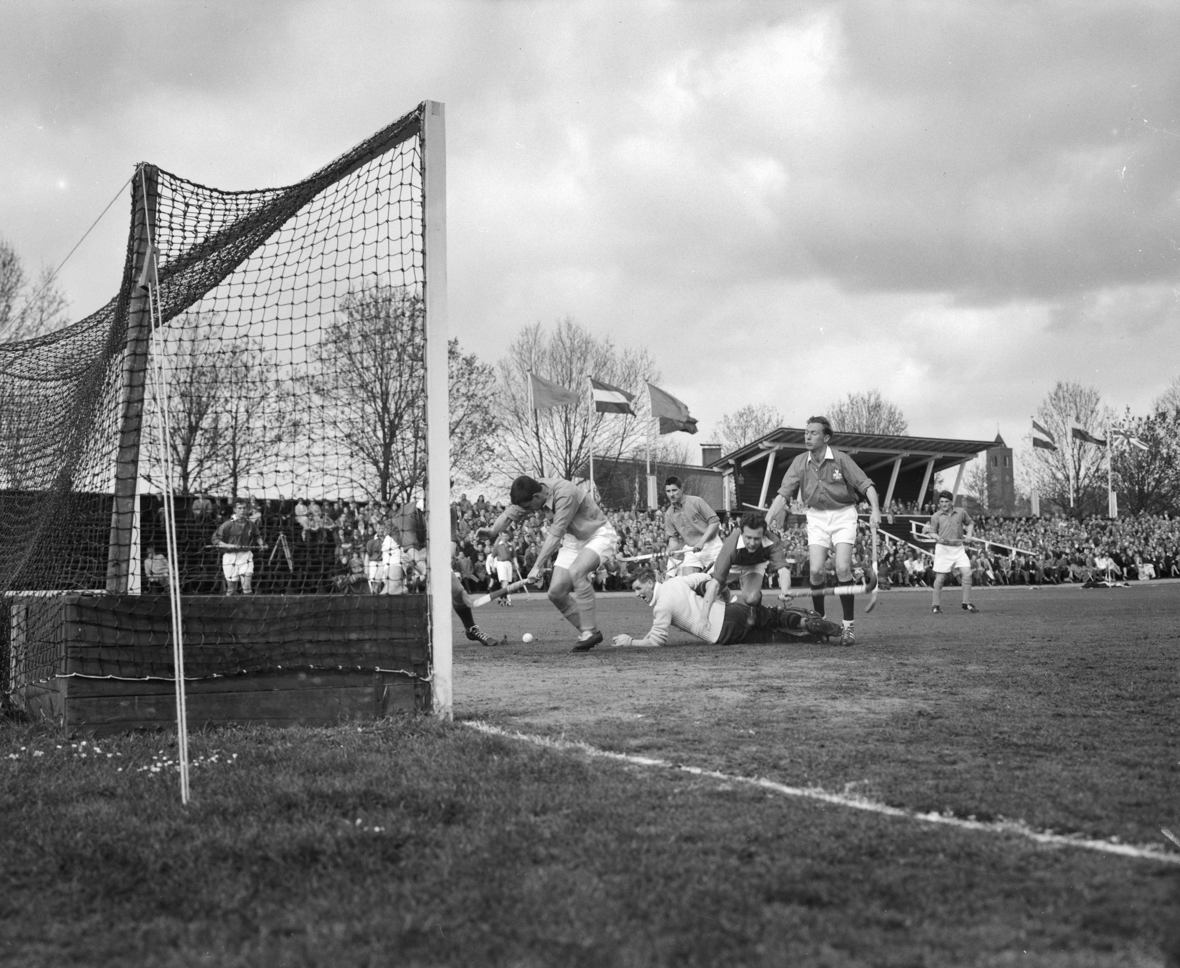 Collectie / Archief : Fotocollectie Anefo Reportage / Serie : [ onbekend ] Beschrijving : Hockey Nederland tegen Wales 3-0 te Amstelveen, doelman Jones (Wales) geslagen Datum : 23 april 1960 Locatie : Amstelveen, Noord-Holland Trefwoorden : doelmannen, hockey Persoonsnaam : Jones Fotograaf : Rossem, Wim van / Anefo Auteursrechthebbende : Nationaal Archief Materiaalsoort : Negatief (zwart/wit) Nummer archiefinventaris : bekijk toegang 2.24.01.04 Bestanddeelnummer : 911-1872